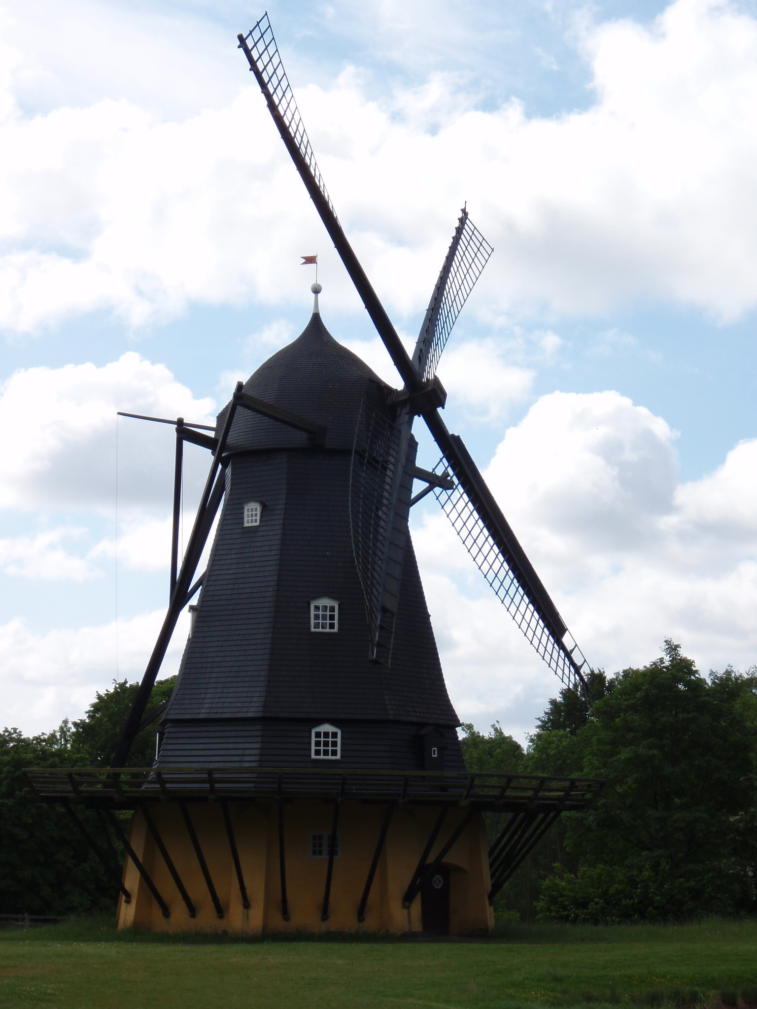 Billede taget på Wiki-fotodag juni 2012. Frilandsmuseet.